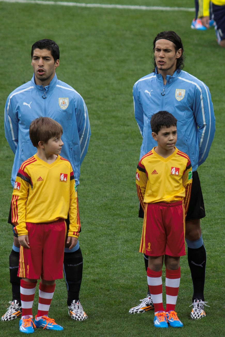 ლუის სუარესი და ედინსონ კავანი